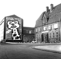 Silkeborg Arkivs gamle tilholdssted på Hostrupsgade. Til venstre i billedet ses Jean Dubuffets gavlmaleri.